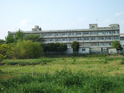 千葉県立柏中央高等学校 校舎南側